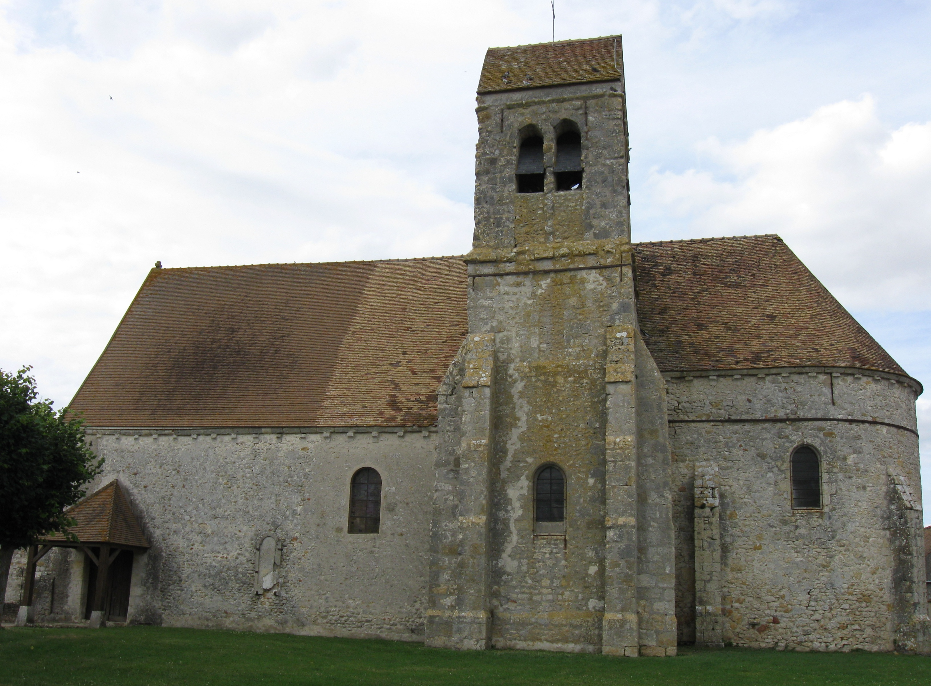 Église Saint-Pierre-et-St-Paul. (Arville, département de la Seine-et-Marne, région Île-de-France)